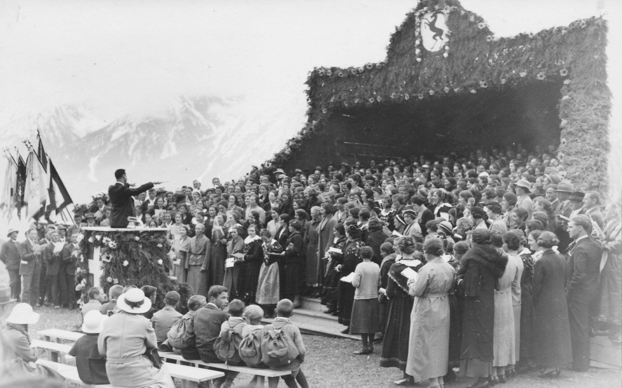 Sängerfest in Ftan im Unterengadin 1935